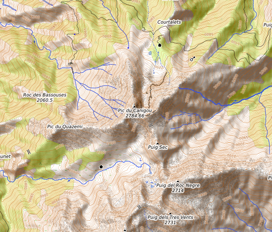 carte réalisée sur umap This map may be incomplete, and may contain errors. Don't rely solely on it for navigation.